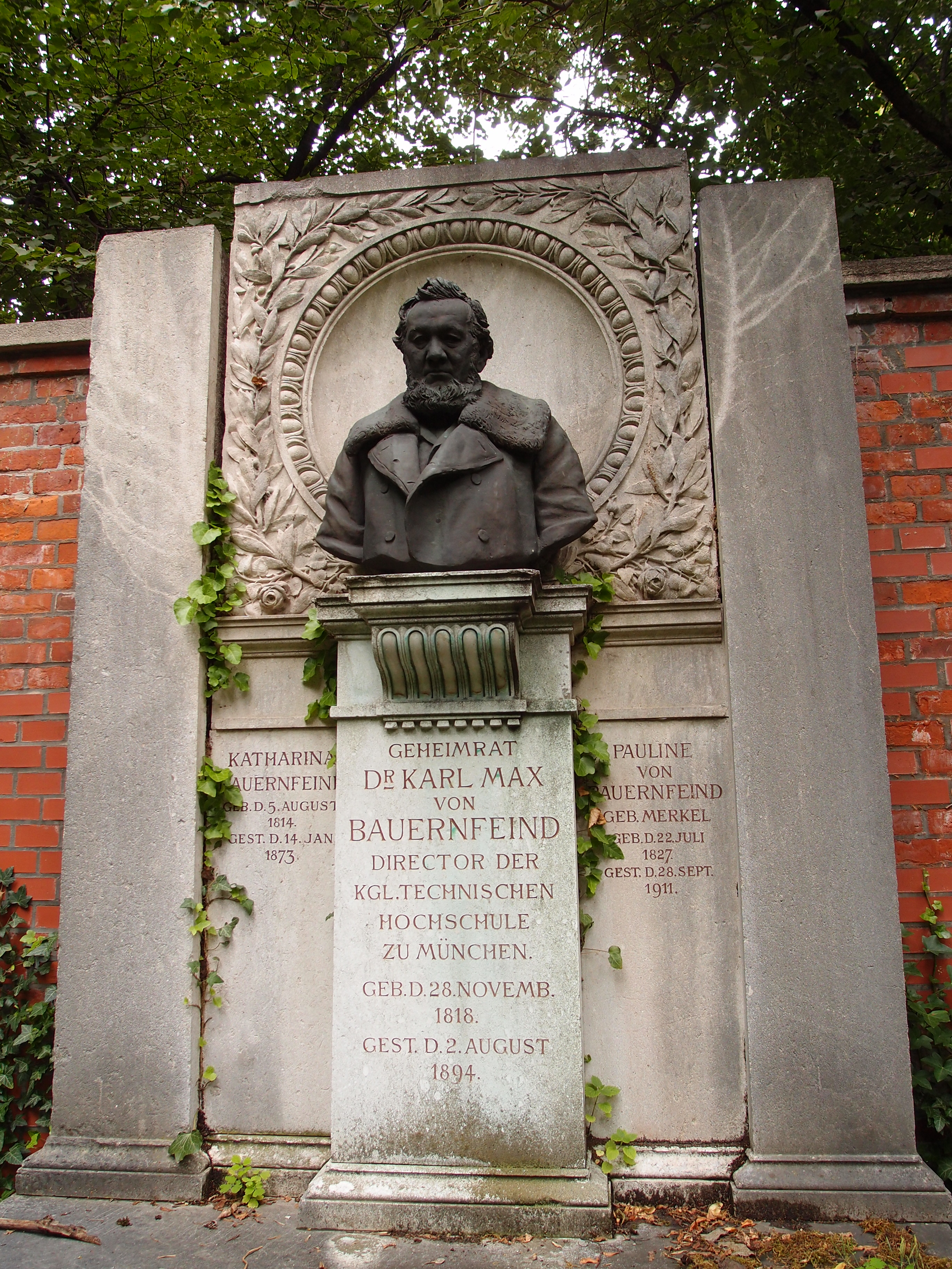 Grab des deutschen Geodäten und Brückenbau-Ingenieurs Karl Maximilian (Max) von Bauernfeind (* 28. November 1818 in Arzberg in Oberfranken; † 3. August 1894 in Feldafing) auf dem Alten Nördlichen Friedhof in München.